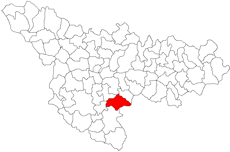 Categorie:Hărţi ale judeţului Timiş